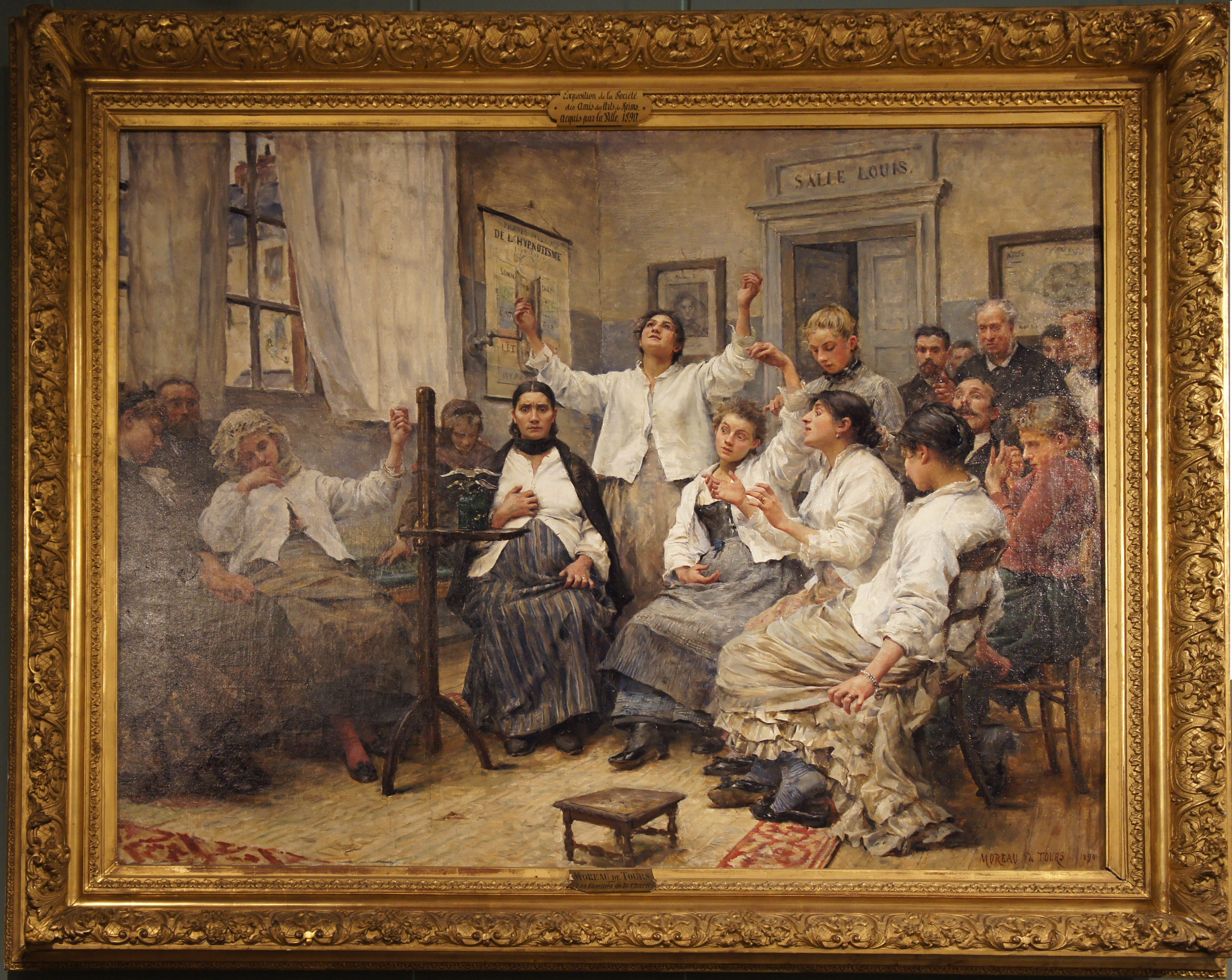 Les fascinés de la Charité. Ancien hôpital de la charité aujourd'hui disparu.